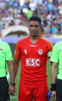 نگاره‌ای از گزارش تصویری دیدار تیم‌های استقلال و فولاد